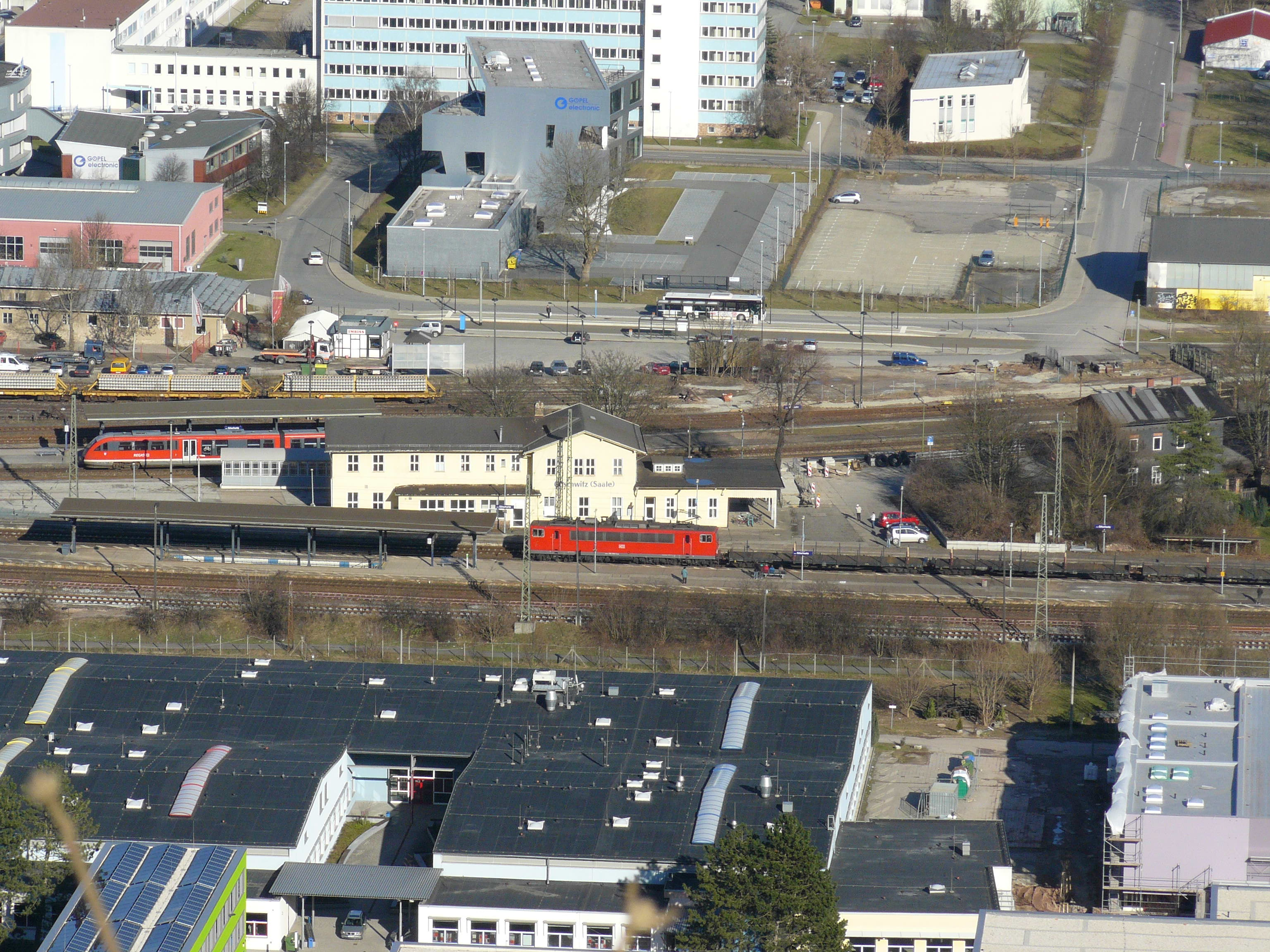 Bahnhof Jena-Göschwitz (Saale) mit Regionalzug in Richtung Gera kurz vor Abfahrt und Güterzug durchfahrend in Richtung Jena. Aufnahme aus ca. 100 Metern Höhe vom Mönchsberg am Rand des ehemaligen Steinbruchs des Zementwerkes und späteren Schießplatzes in östlicher Richtung.